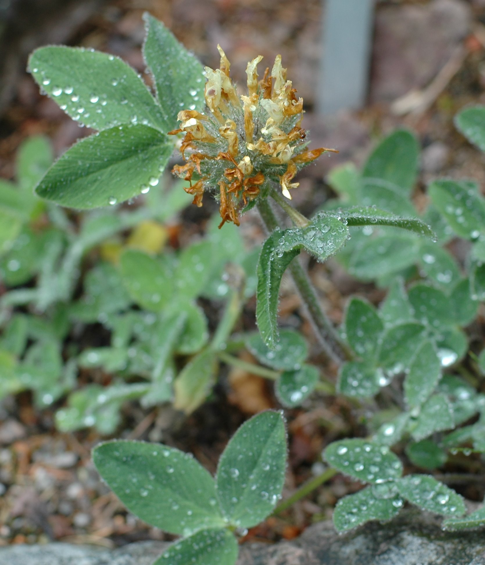 Trifolium trichocephalum at Rennsteiggarten, Oberhof